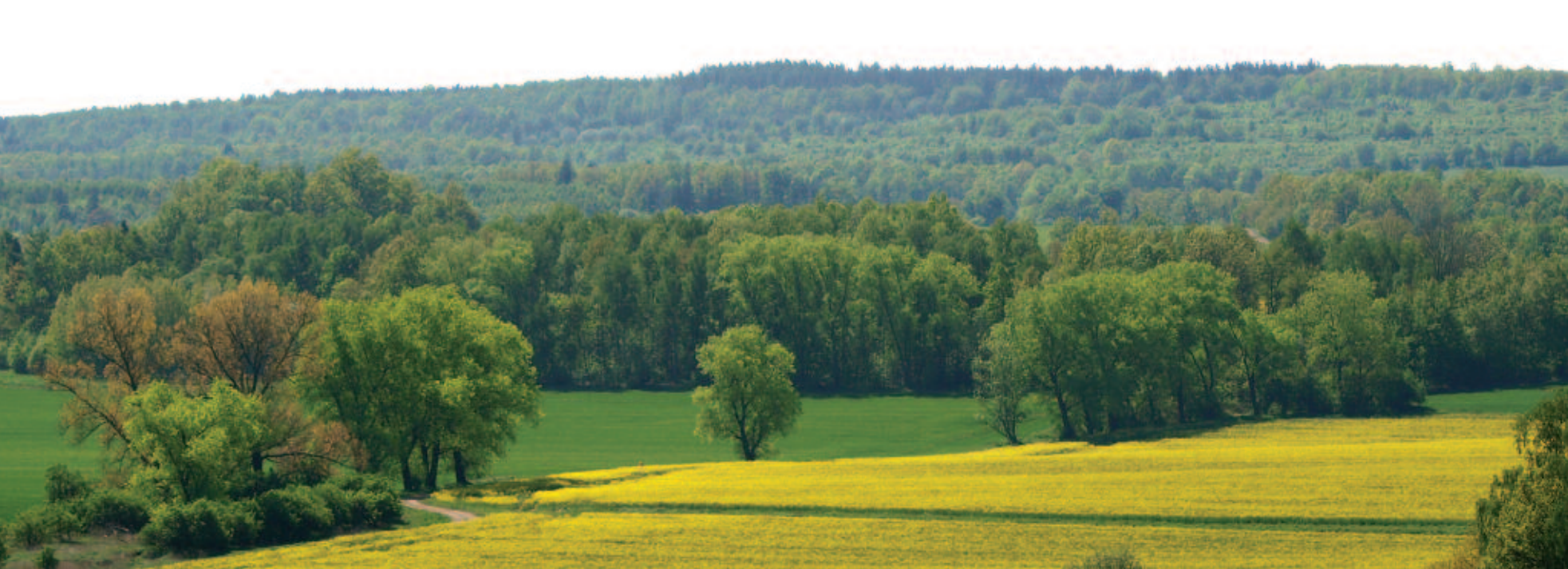 Okolice Pól Agatowych, Płóczki Górne